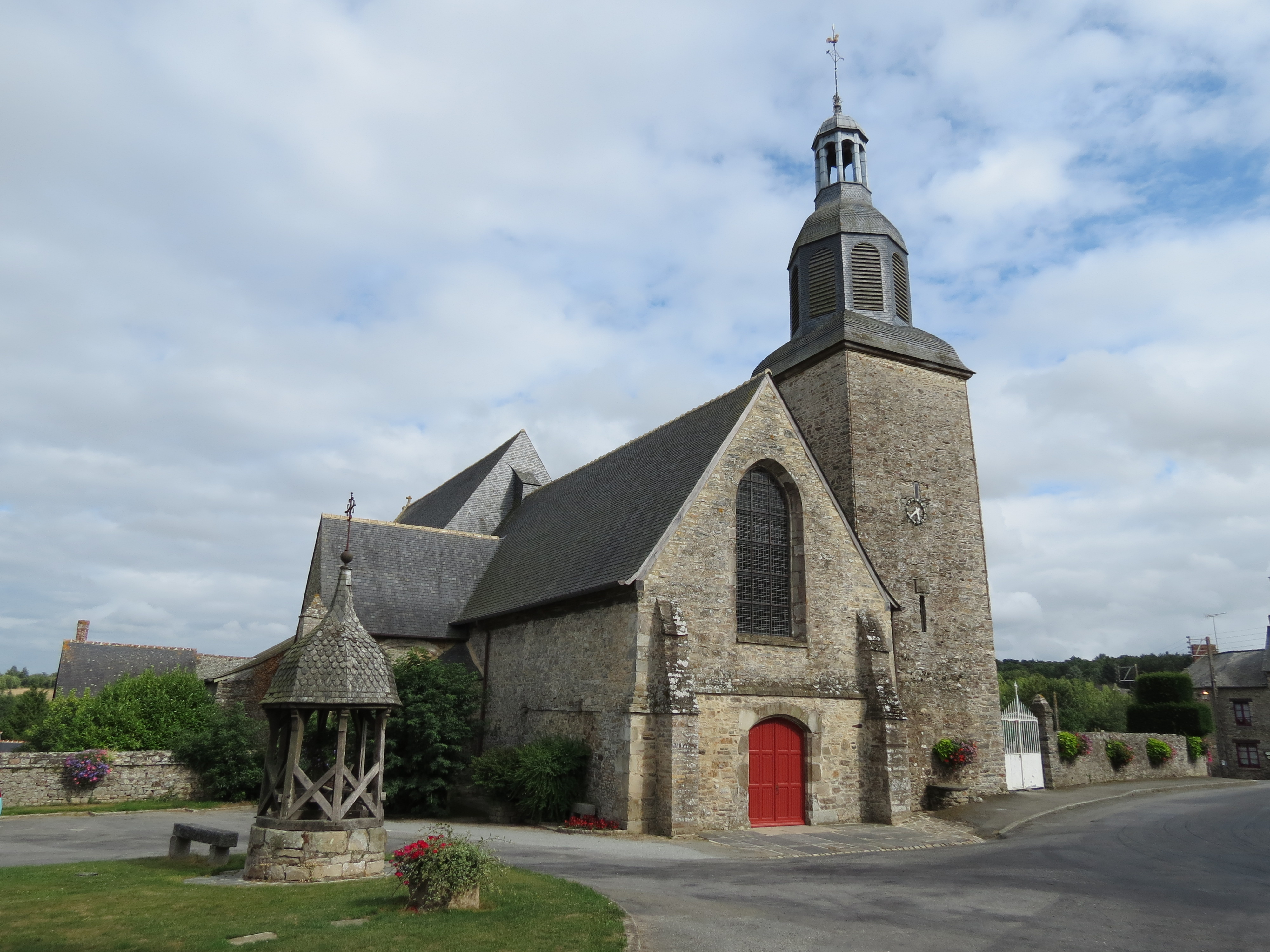 Collégiale Sainte-Madeleine de Champeaux.